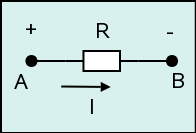 Polaridad de la diferencia de potencial (Polarity of the potential difference)